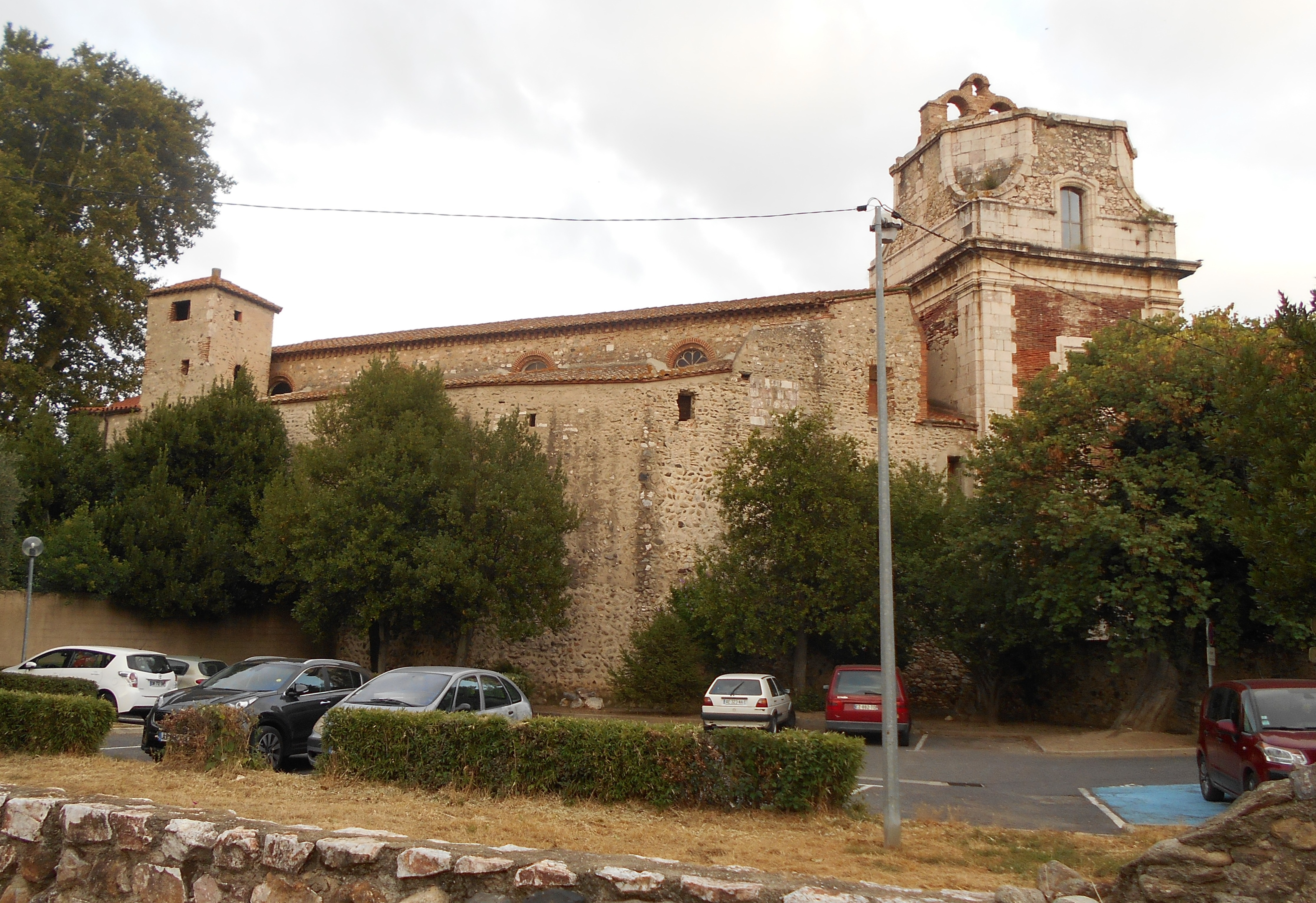 Sant Esteve d'Estagell